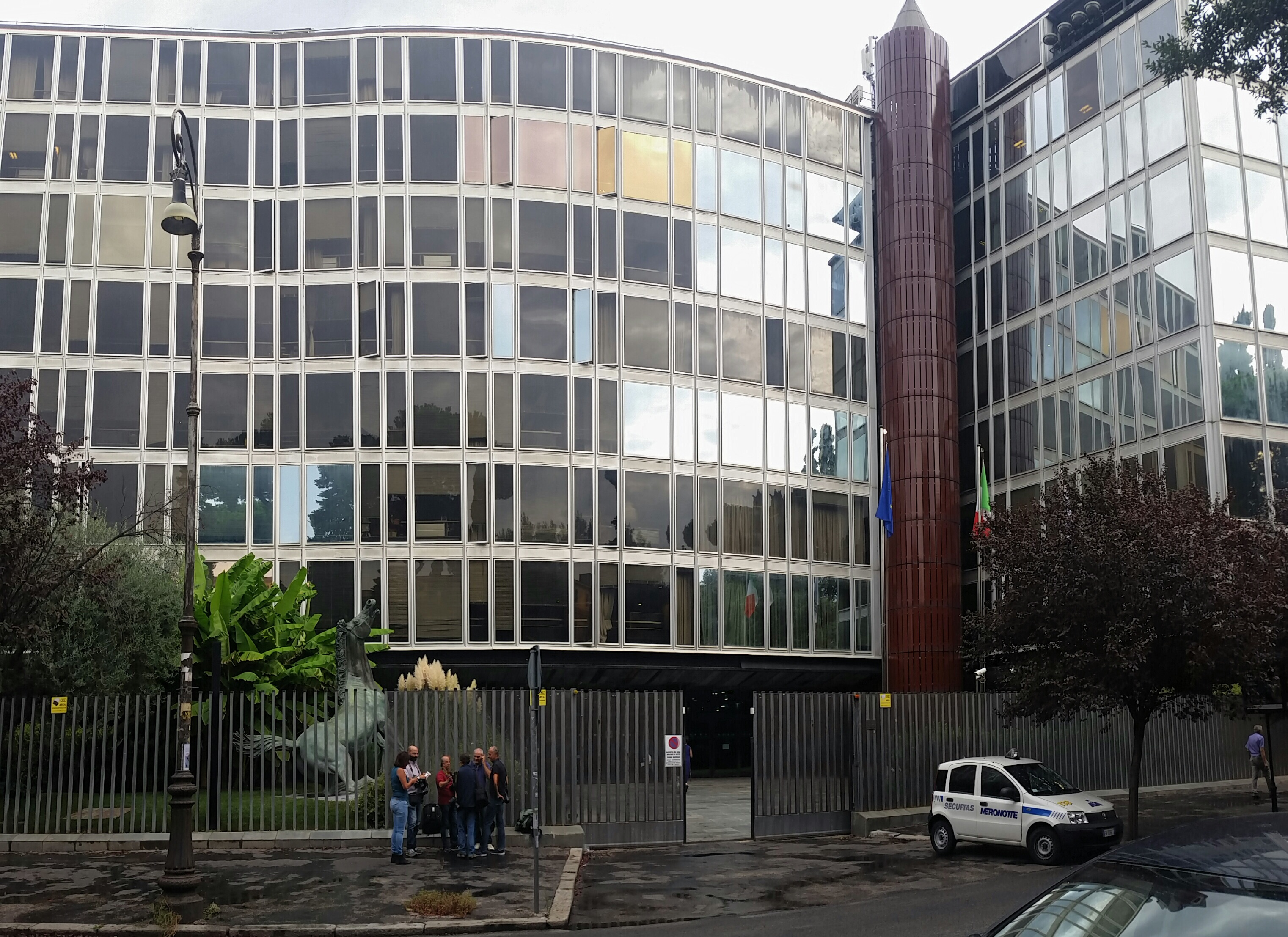 Sede centrale della RAI a Roma, in Viale Giuseppe Mazzini